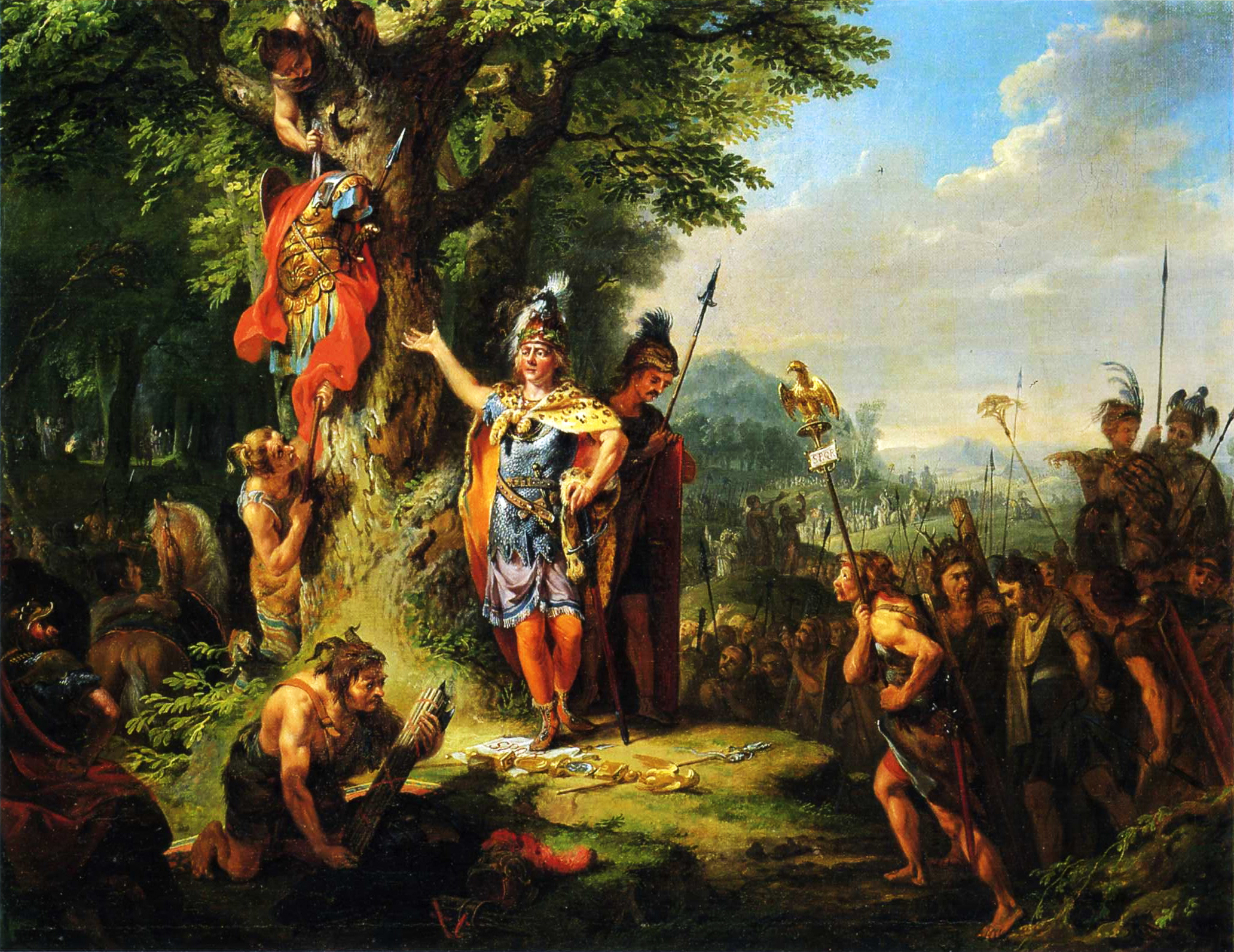 Der Triumph Hermanns nach seinem Sieg über Varus von Johann Heinrich Tischbein d.Ä. Öl auf Leinwand, 65 x 83 cm. Museum im Schloss Bad Pyrmont. Dauerleihgabe Stiftung Niedersachsen.